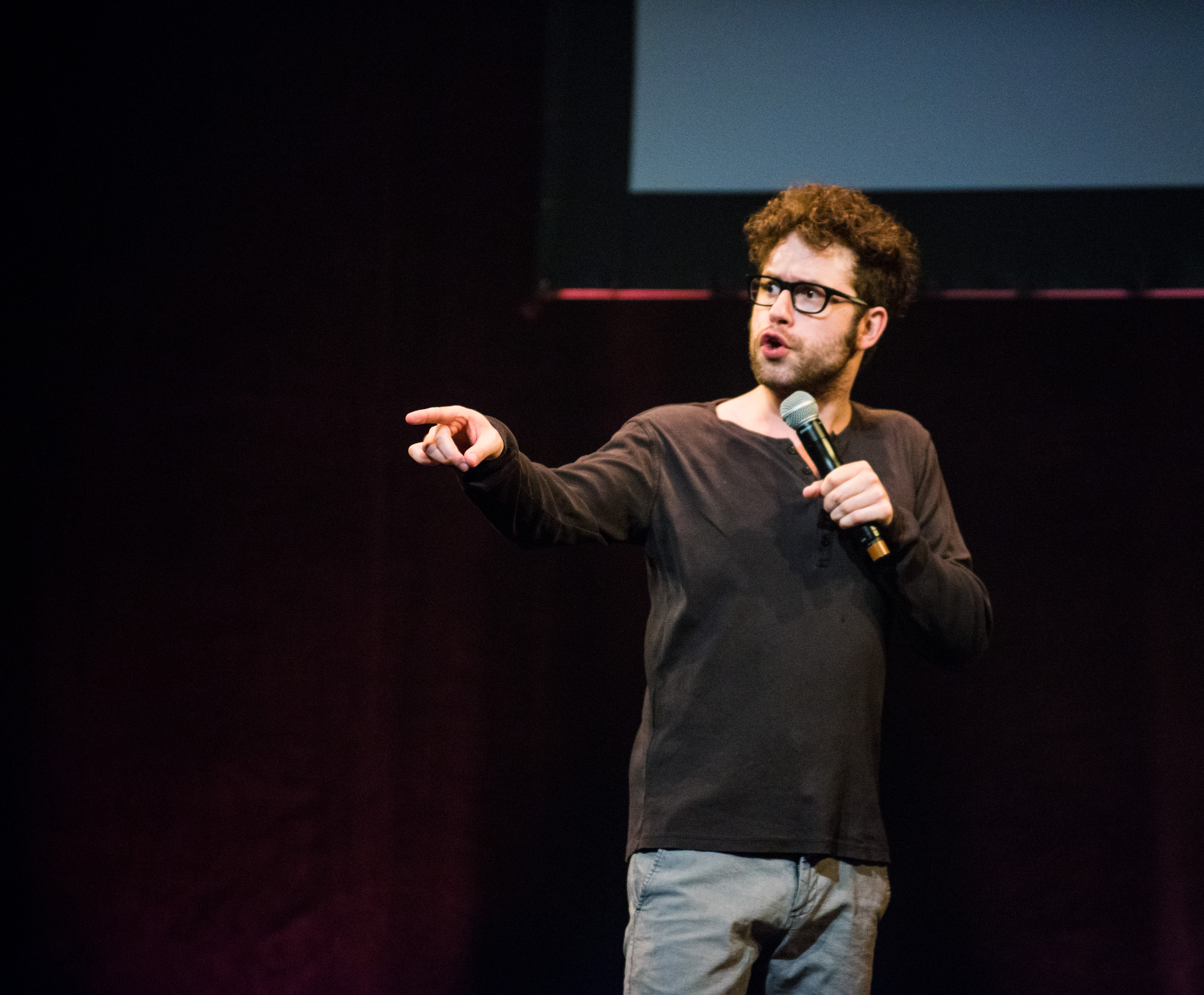 Fred Dubé, lors d'une représentation de son spectacle solo Radical Pouding, le 18 juillet 2015.